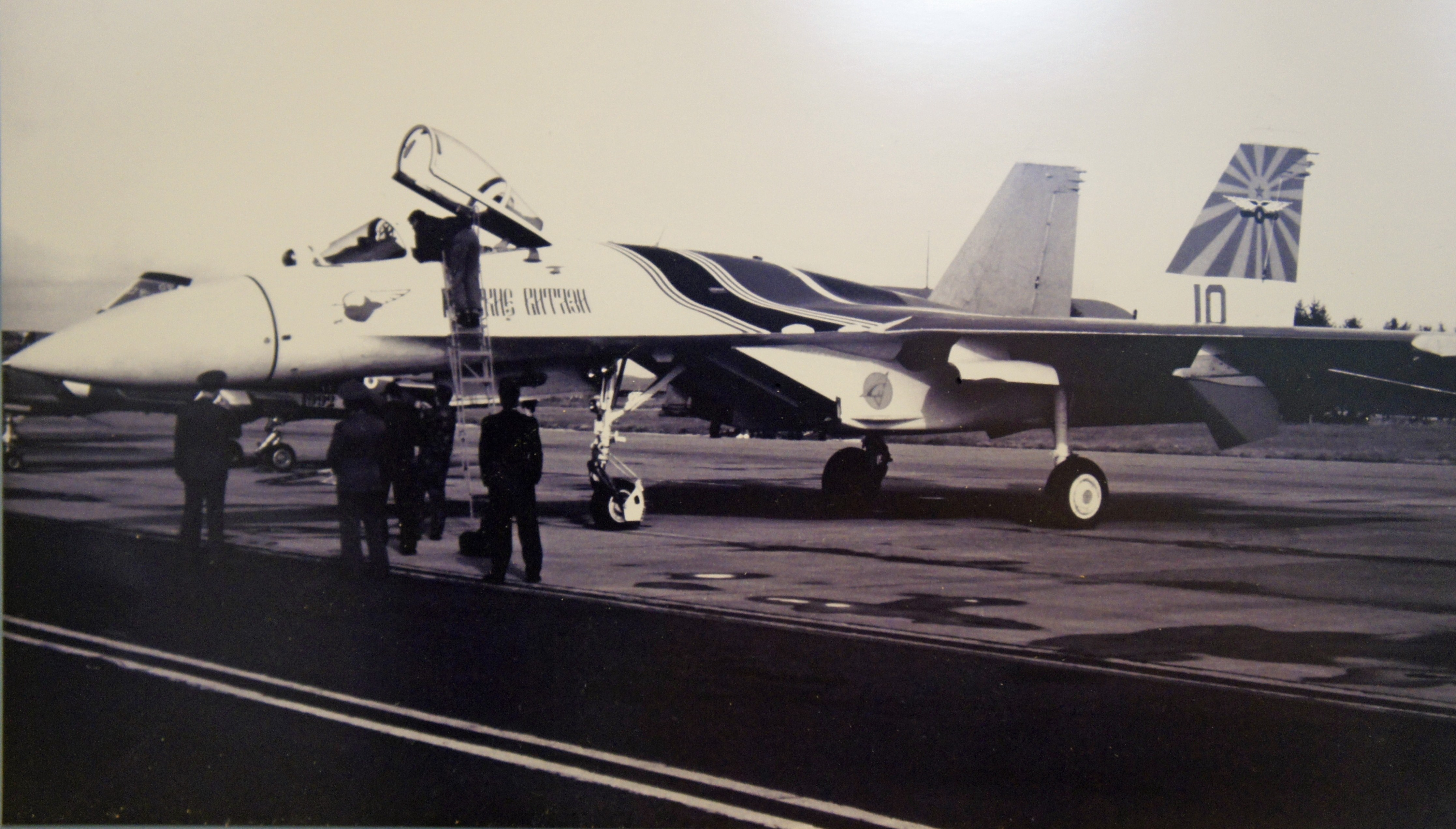 Musée de l'aéronautique Bétheny, image d'un échange dans le cadre de Normandie-Niemen d'un Sukhoï Su-27 de la patrouille des "Russians Knights" en septembre 1992.